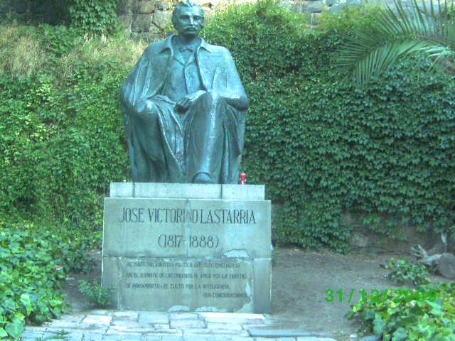 Monumento a José Victorino Lastarria, obra del escultor chileno Raúl Vargas, a los pies del cerro Santa Lucía, Santiago de Chile.